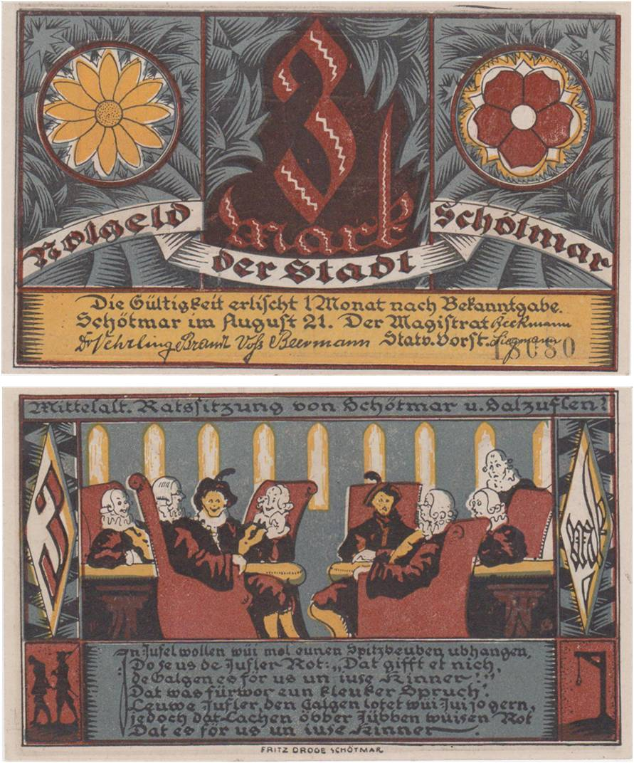 Deutschland - Nordrhein-Westfalen - Kreis Lippe - Bad Salzuflen - Schötmar: 3-Mark-Notgeld-Schein der Stadt Schötmar